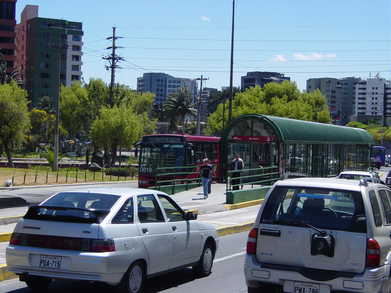 Parada de la Ecovía - Quito. Lada 2112, Suzuki Grand Vitara.